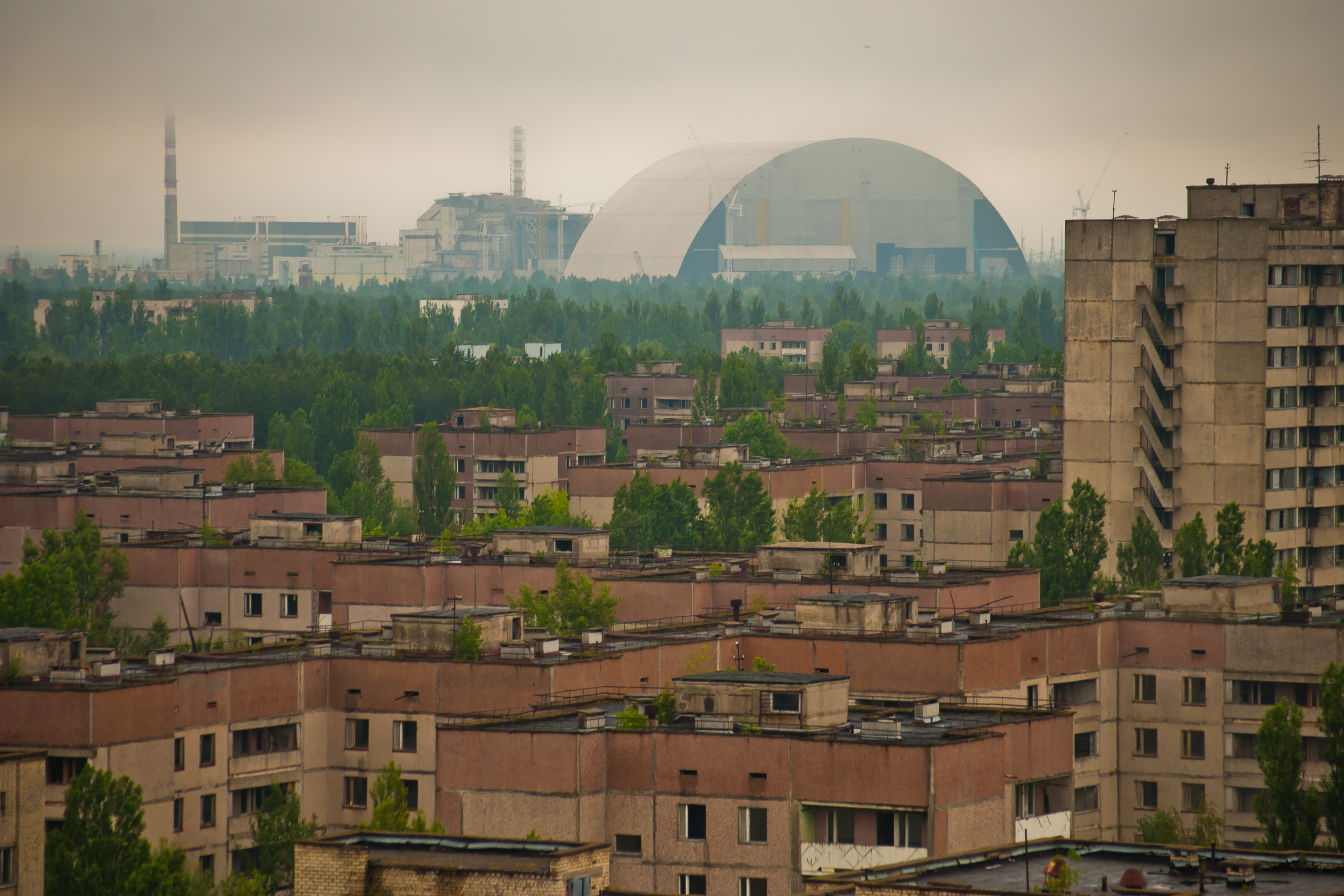 Чорнобильський радіаційно-екологічний біосферний заповідник, Іванківський район, Поліський район, в межах зони відчуження і зони безумовного (обов'язкового) відселення території, що зазнала радіоактивного забруднення внаслідок Чорнобильської катастрофи